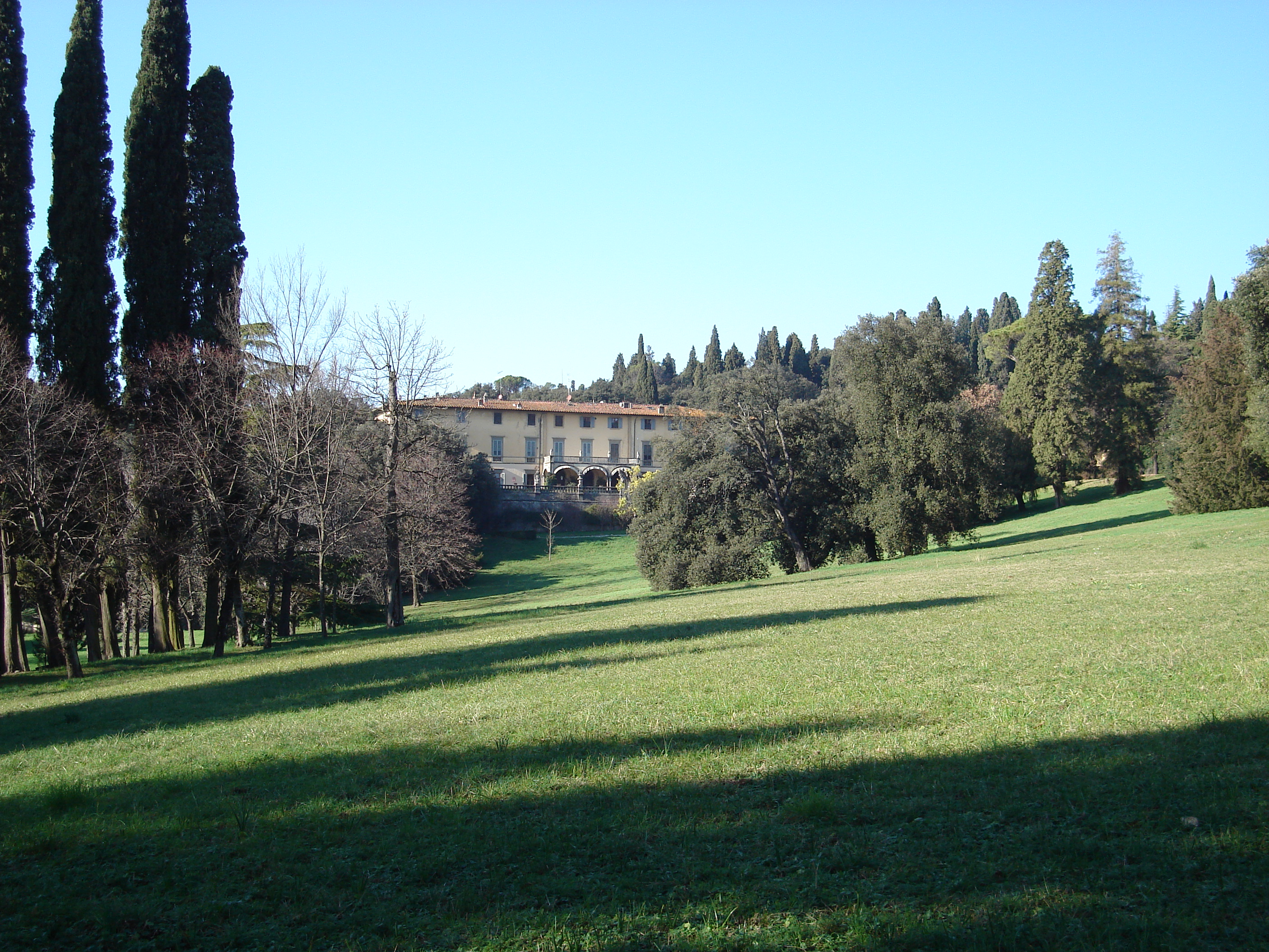 Il parco e la villa di Quarto